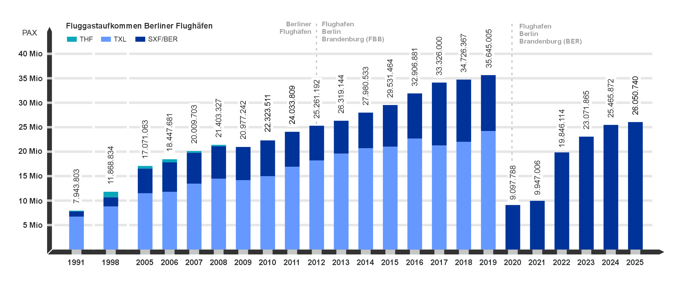 Fluggastzahlen der Berliner Flughäfen